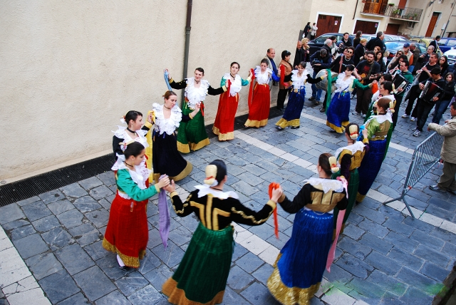 Le vallje sono danze e canti con cui gli albanesi di Calabria rievocano le gesta dell'eroe albanese Giorgio Castriota Scanderbeg. I canti sono di solito cori accompagnati da più strumenti musicali. Il ballo, la vallja, è costituita da una "catena" di Arbëreshë che si tengono per mano o legati da un fazzoletto colorato, cantano e ballano. La vallja si sposta sempre, come un drappello di soldati in battaglia. I balli si snodano nelle vie del paese e terminano nella "piazza delle vallje". Wikipedia: Civita; Parco Nazionale del Pollino. Wikipedia: Giorgio Castriota Scanderbeg; Arbëreshë